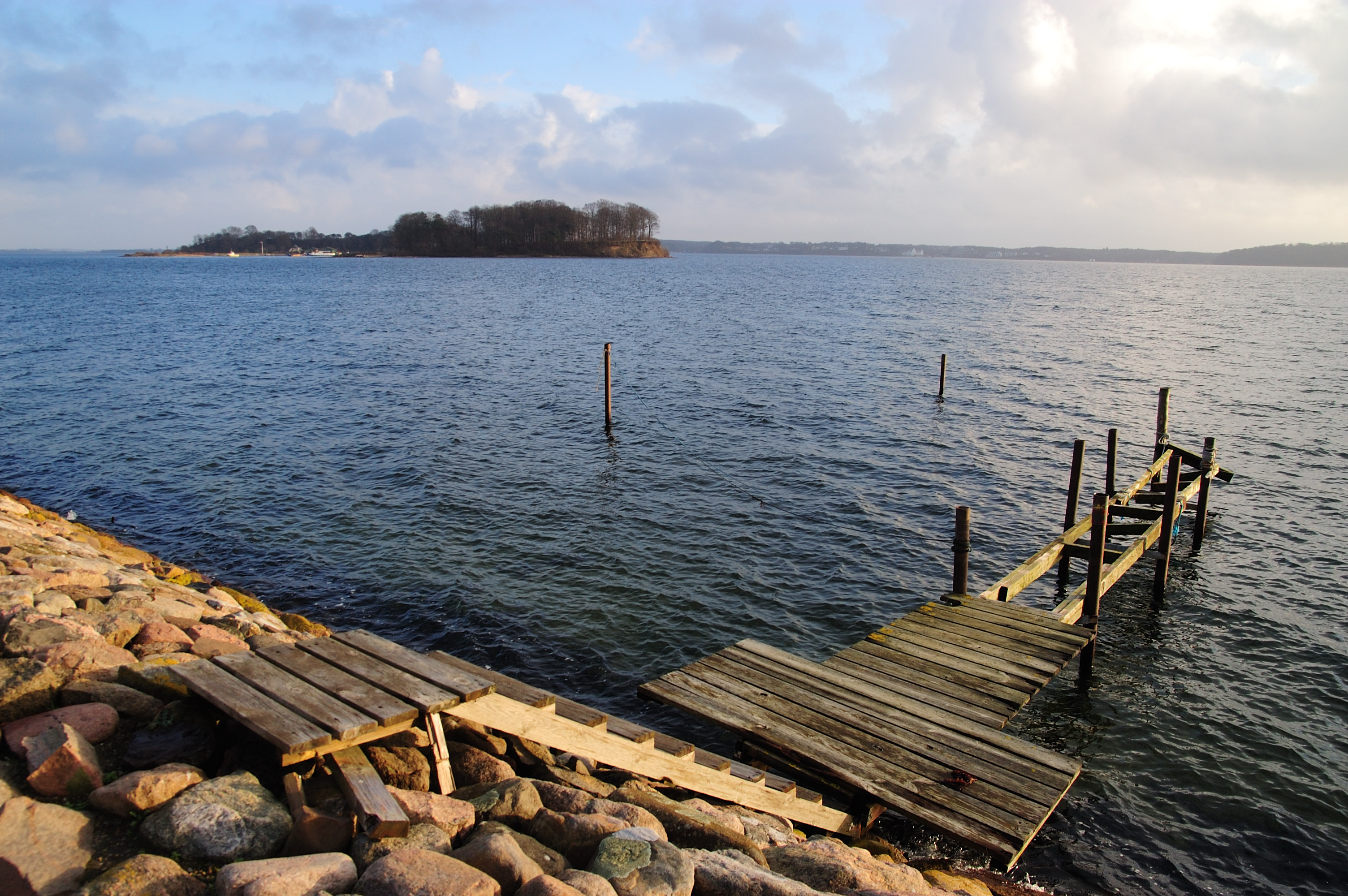 Sønderhav at Flensburg Fjord, Okseøerne